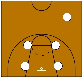 Basketball Zone Defense